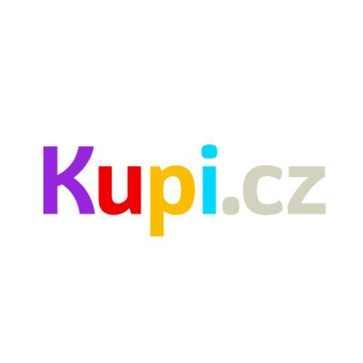 Kupi.cz retail